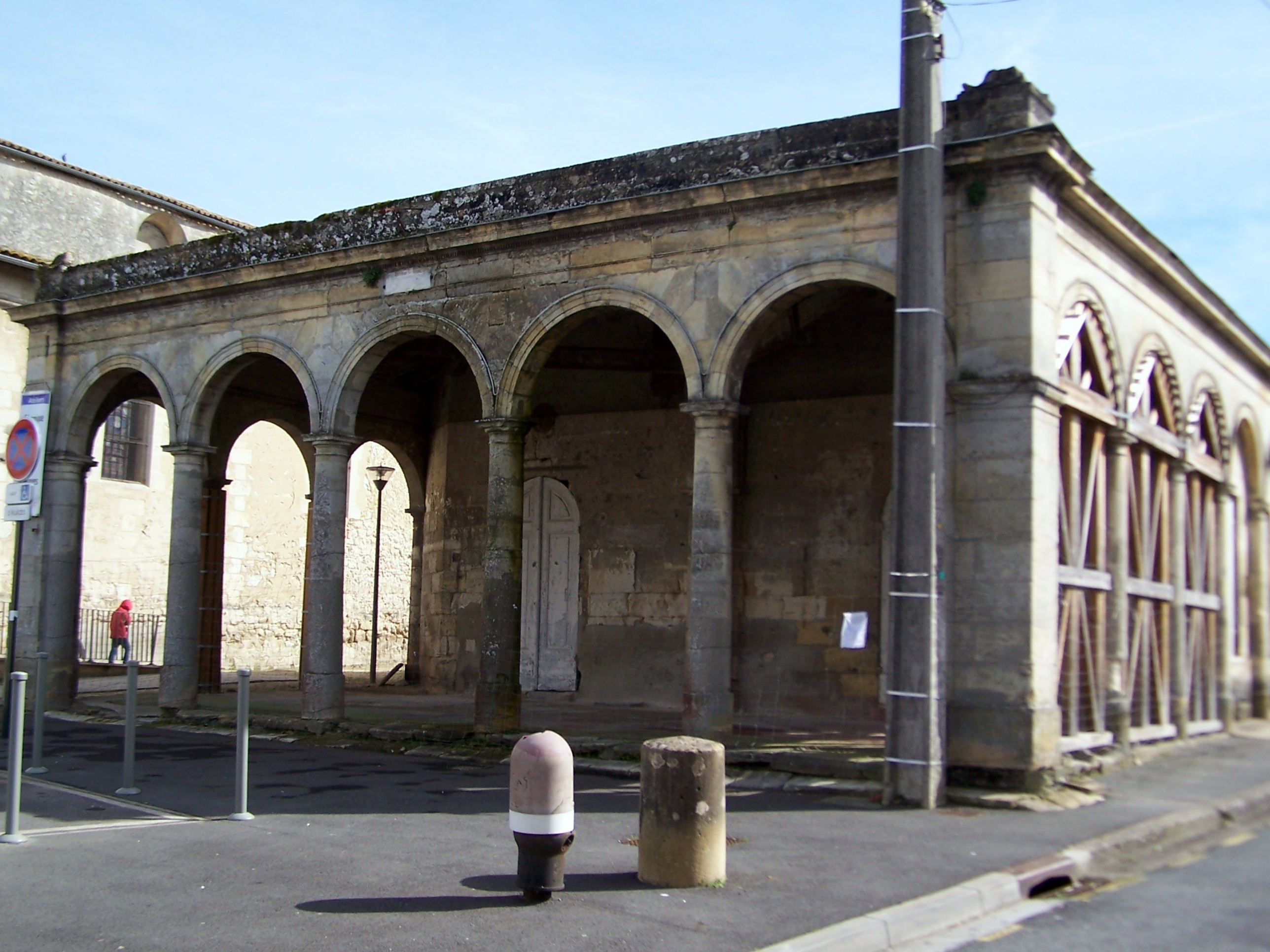 La Vieille Halle à Ambarès-et-Lagrave (Gironde, France)